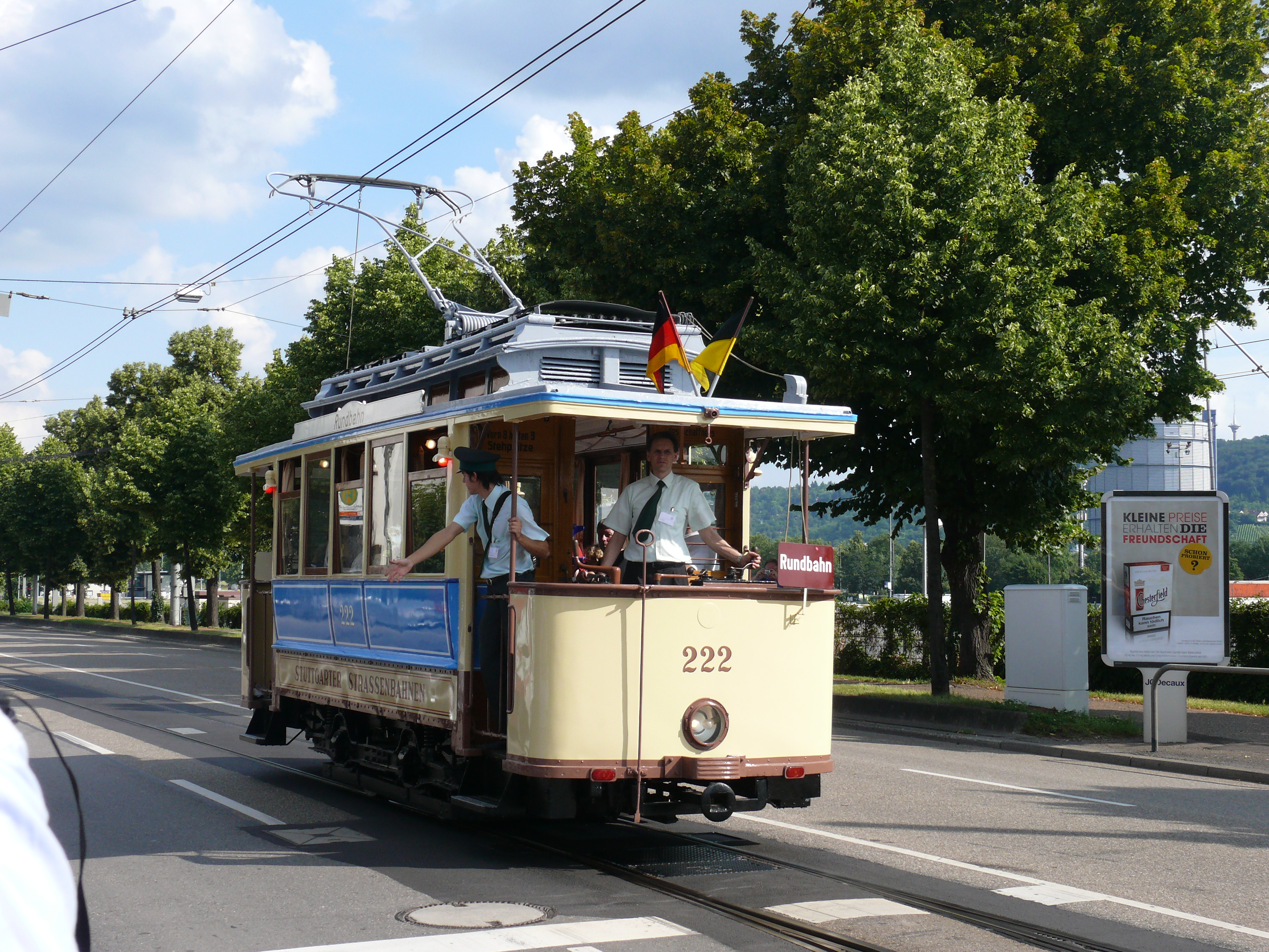 Triebwagen 222 der SSB, vor dem Straßenbahnmuseum in Stuttgart während einer Rundfahrt.